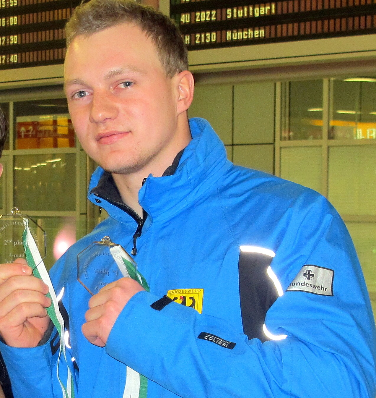 Bobweltmeister Francesco Friedrich aus Pirna